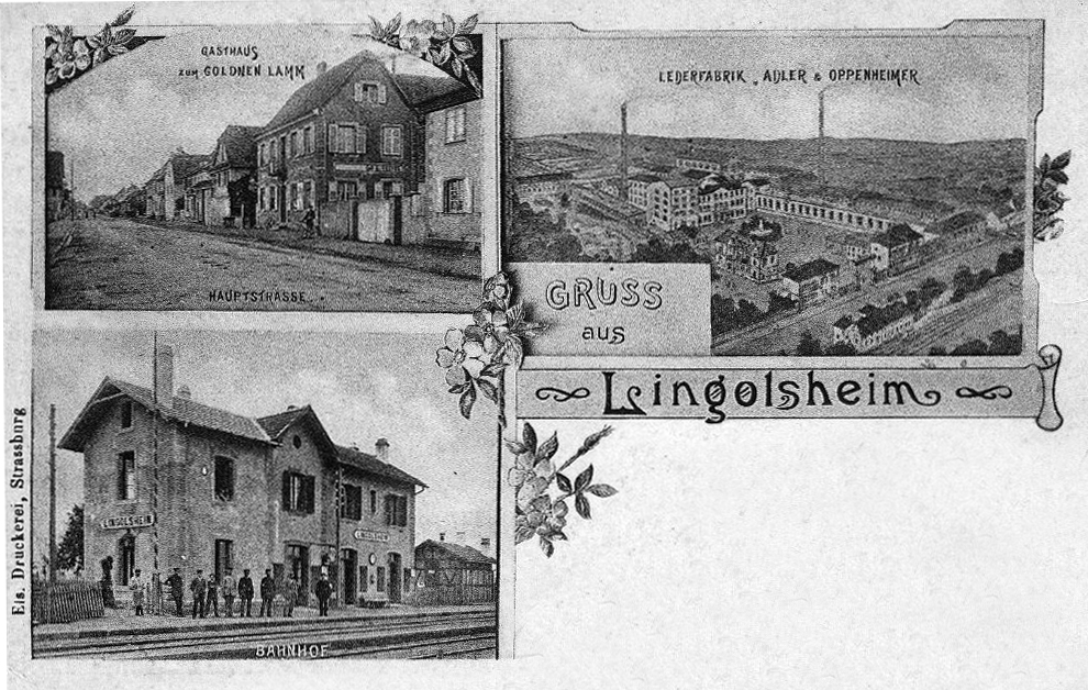 Carte postale ancienne de Lingolsheim (durant la période allemande 1871-1918) comprenant une photographie de la gare (Bahnhof).